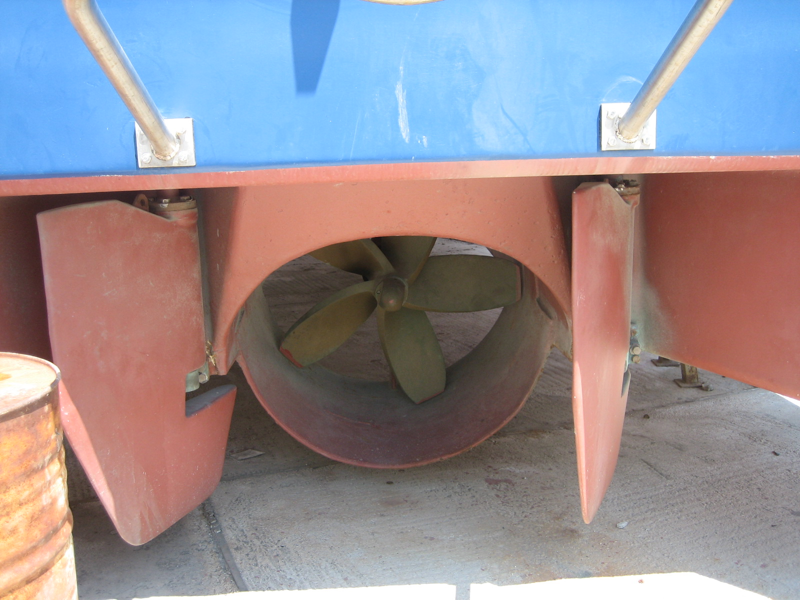 propeler na DJB-u